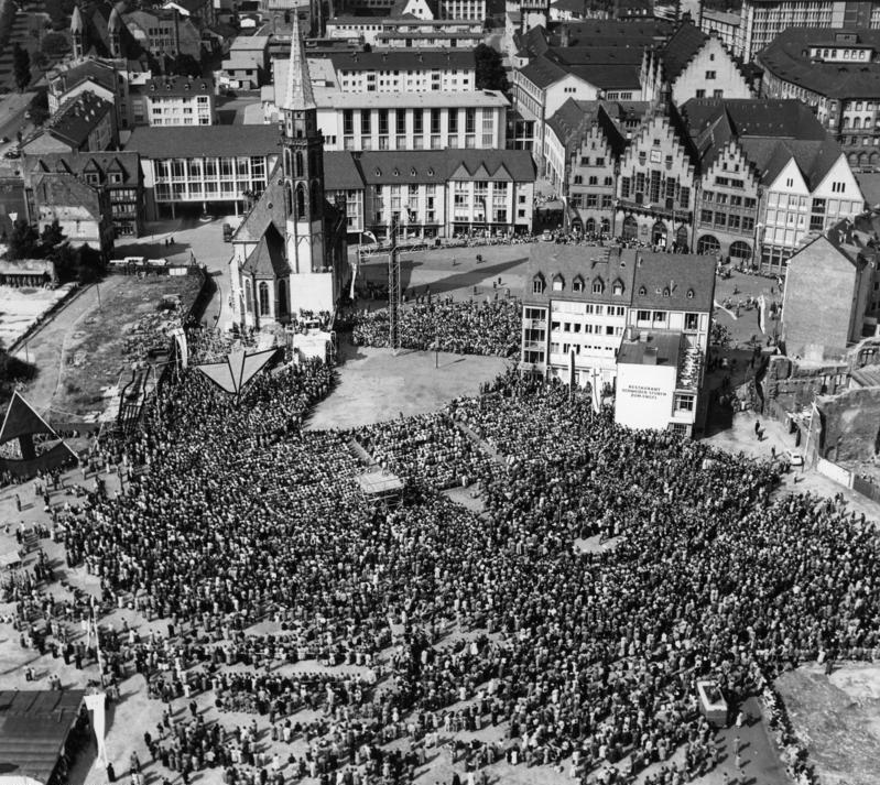 7.-12.8.1956 anläßlich des Deutschen Evangelischen Kirchentages in Frankfurt/Main Eröffnungsgottesdienst auf dem Römerberg, 8.8.1956